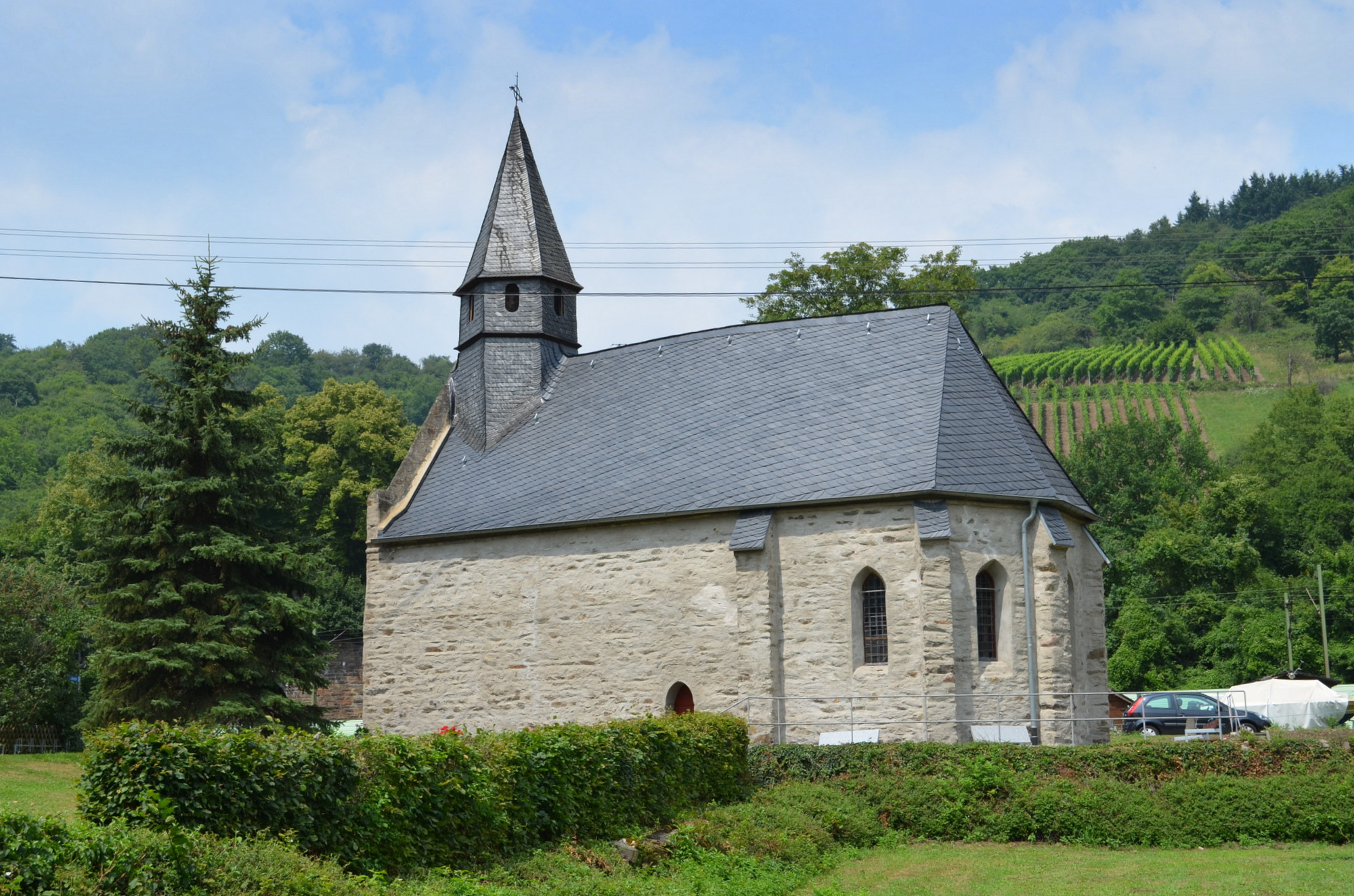 Spay, Petruskapel